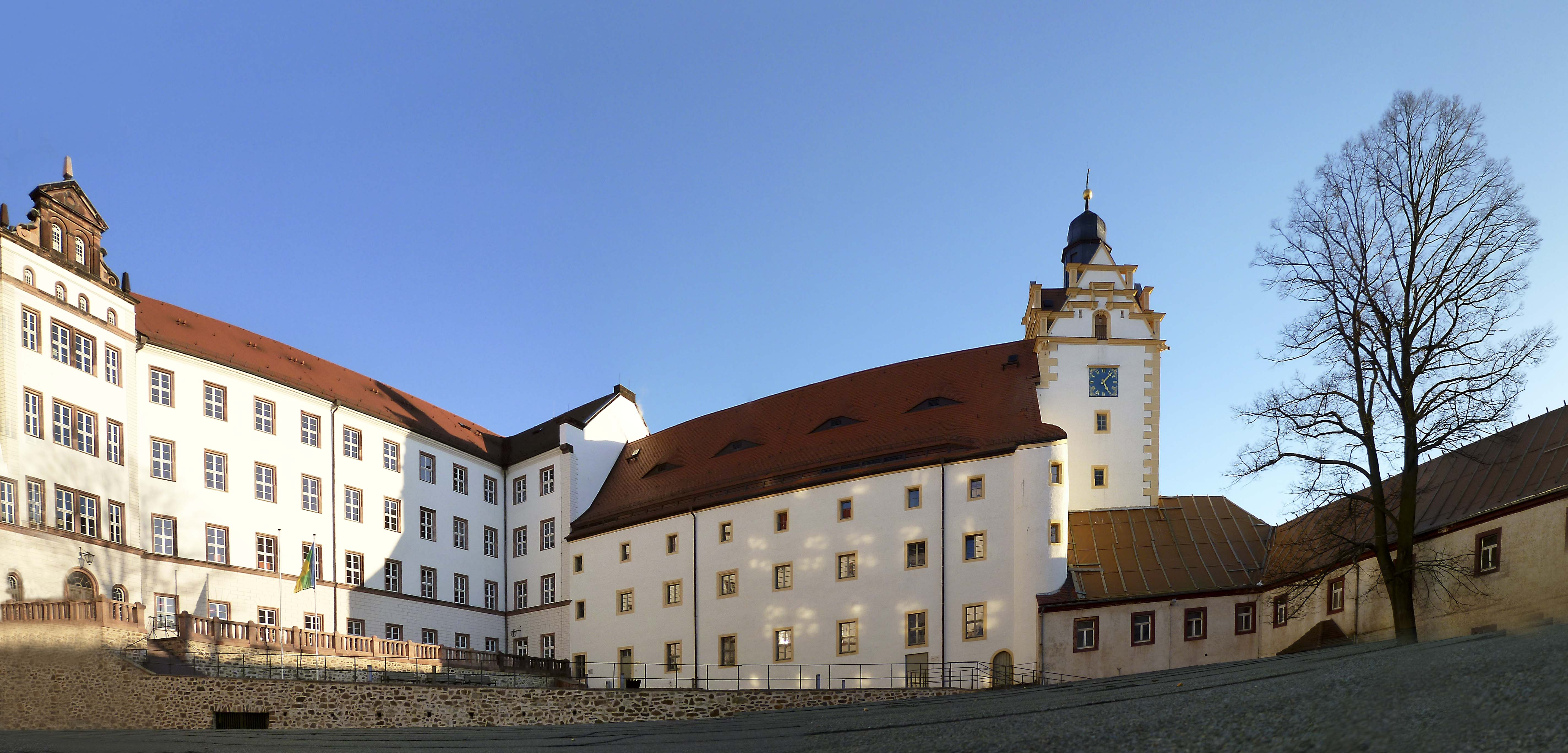 Schloss Colditz Panorama Schlosshof